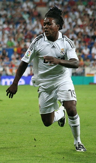 Drenthe lors d'un match contre Valence.